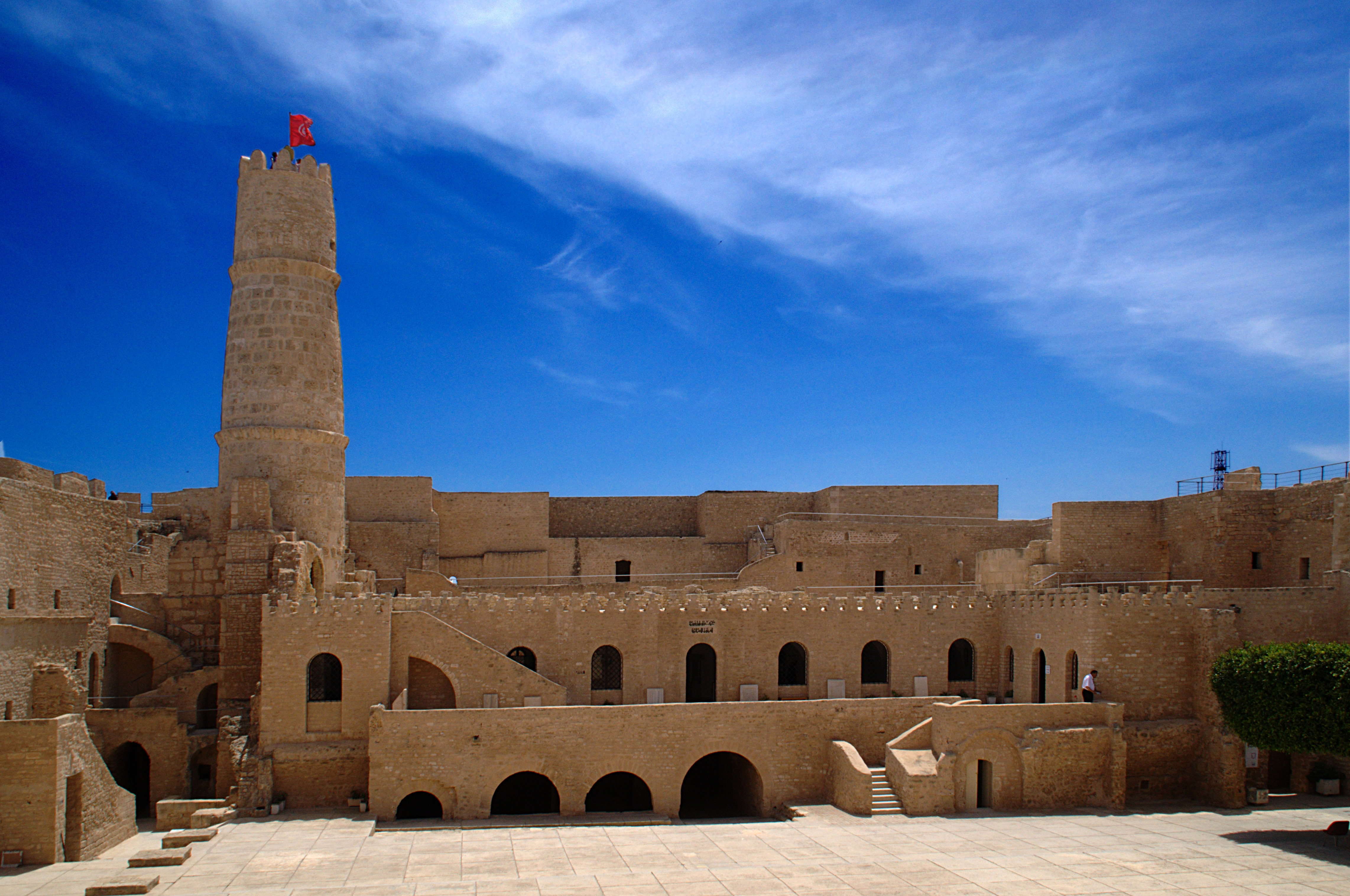 Kasba, Monastir